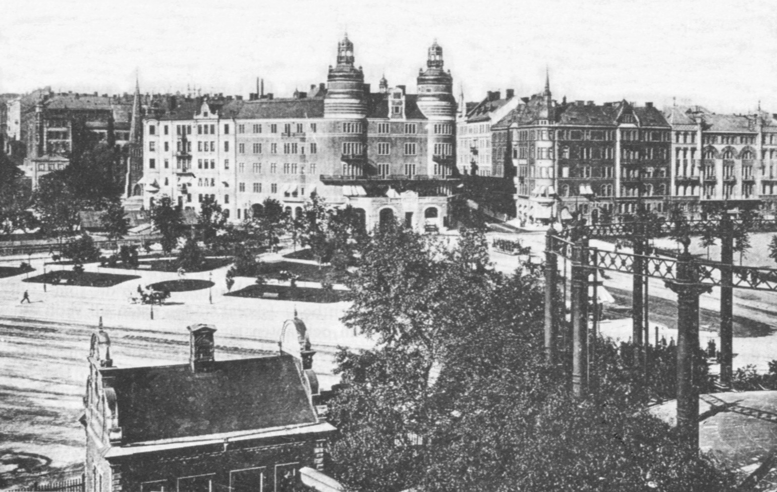 Norra Bantorget vy mot norr